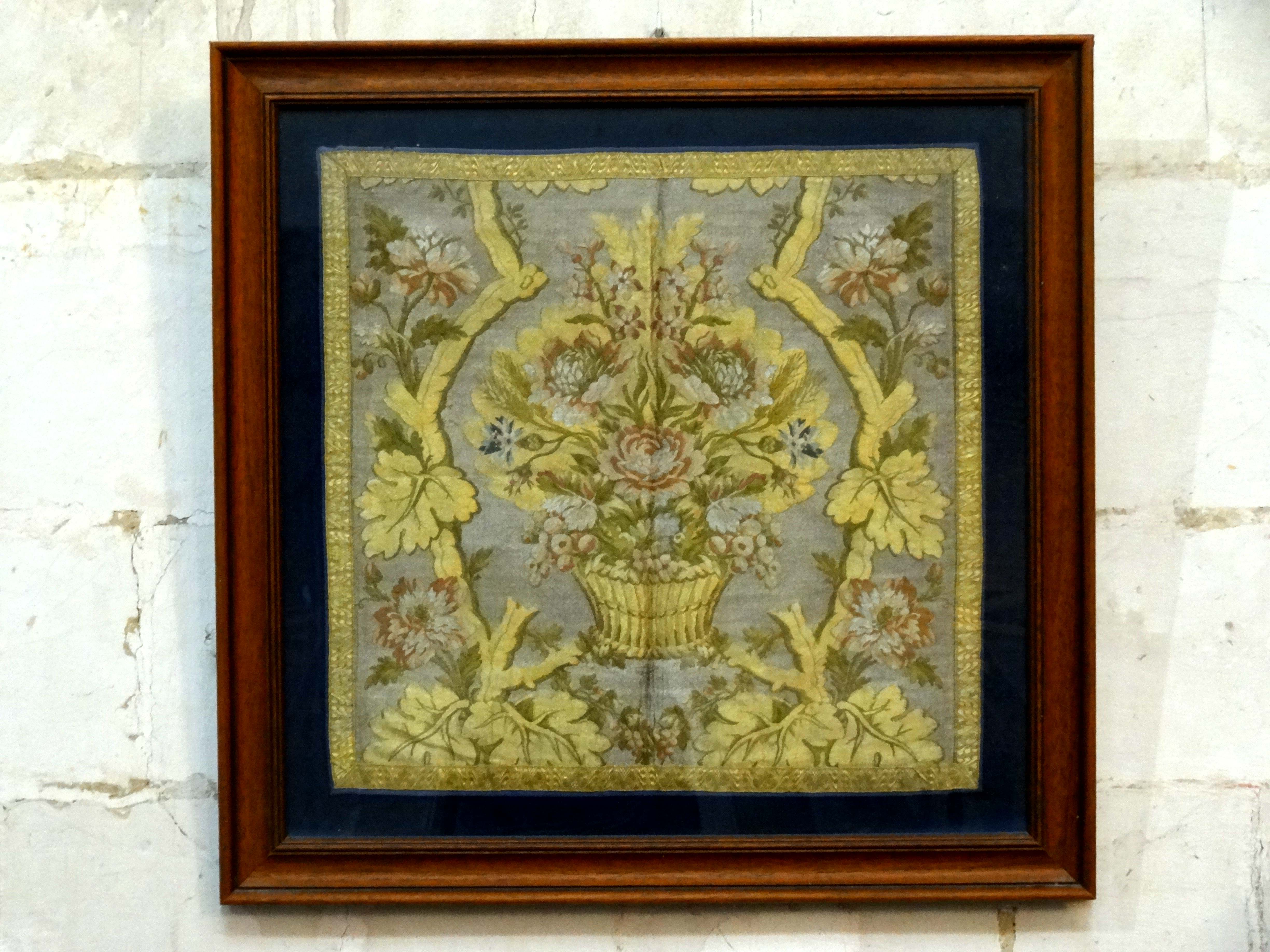 Mobilier de l'église - voir titre.